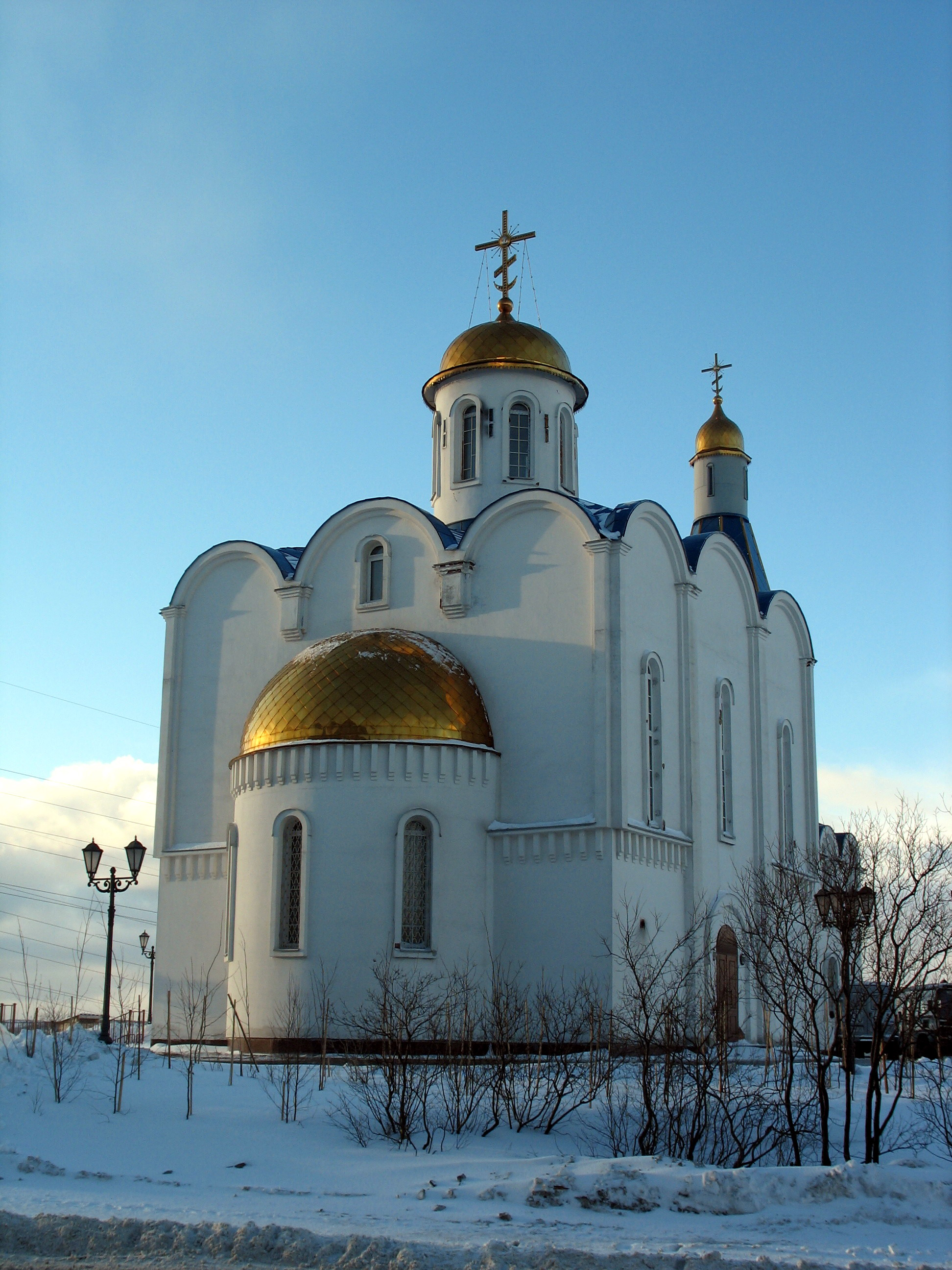 Храм Спас-на-Водах